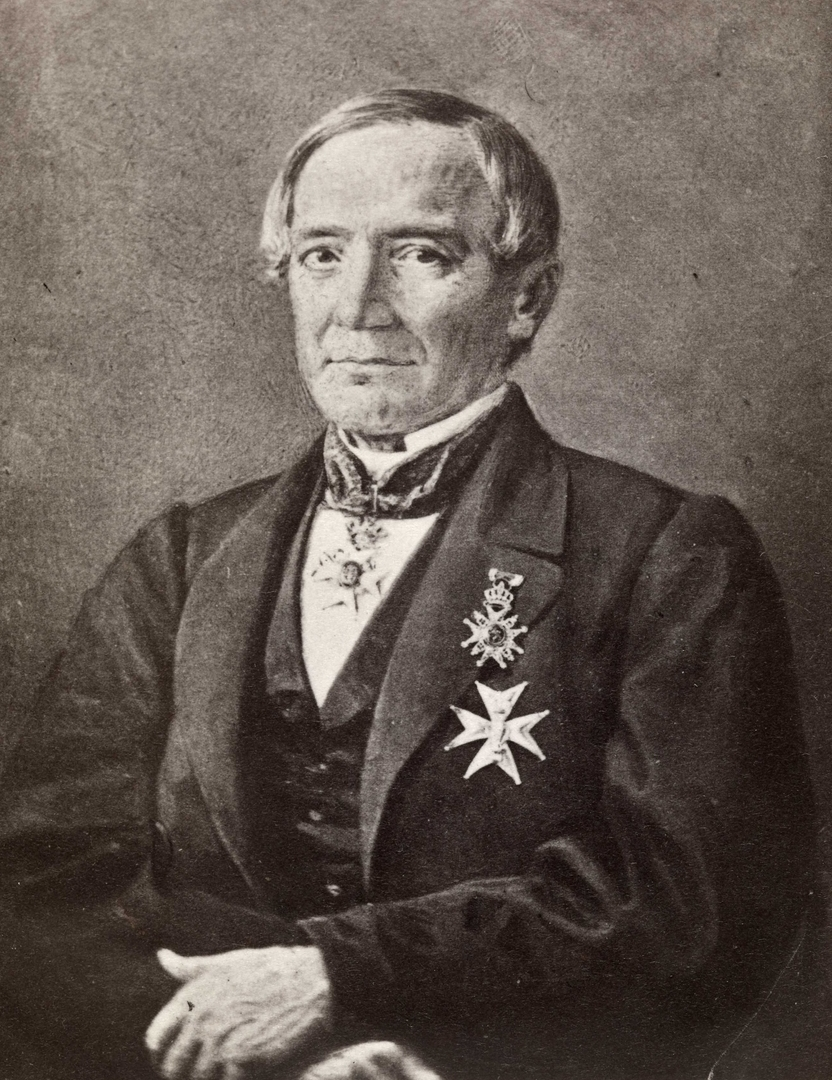 Litografi etter maleri av Peter Nicolai Arbo fra 1866, Norsk portrettarkiv.